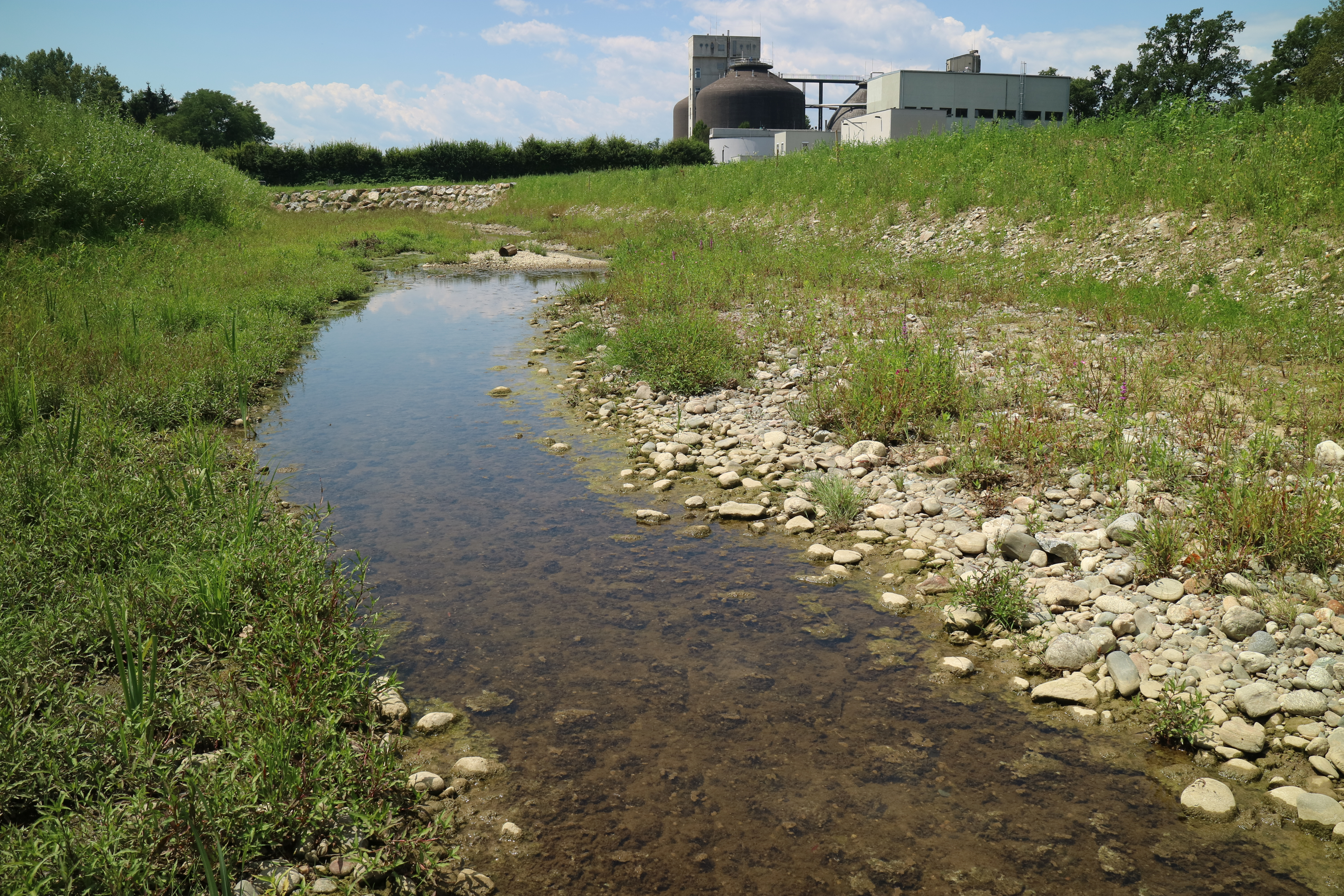 Raababach in der Gemeinde Gössendorf (Steiermark)